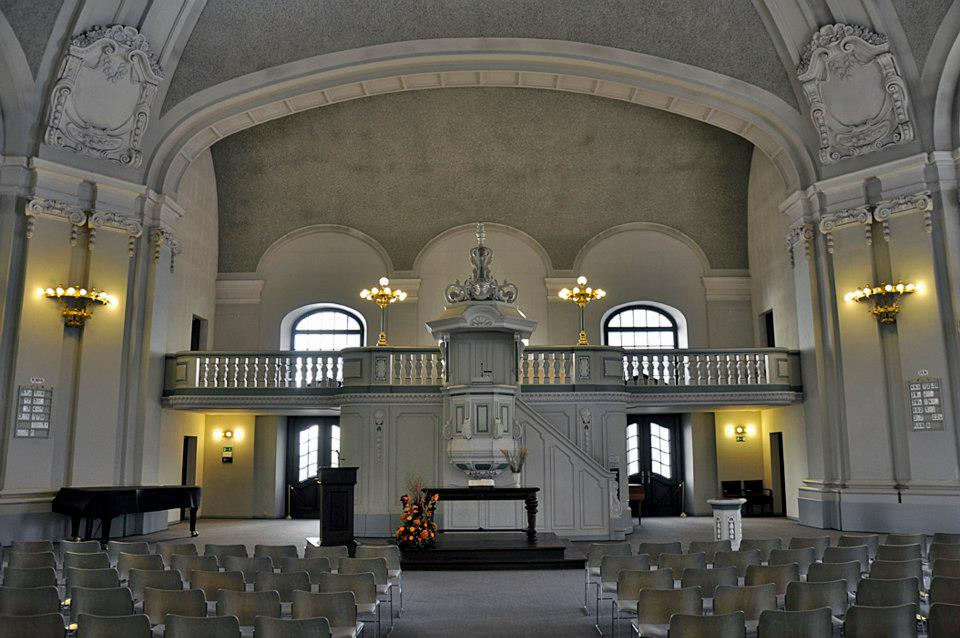 Berlin, Französischer Dom - Innenansicht